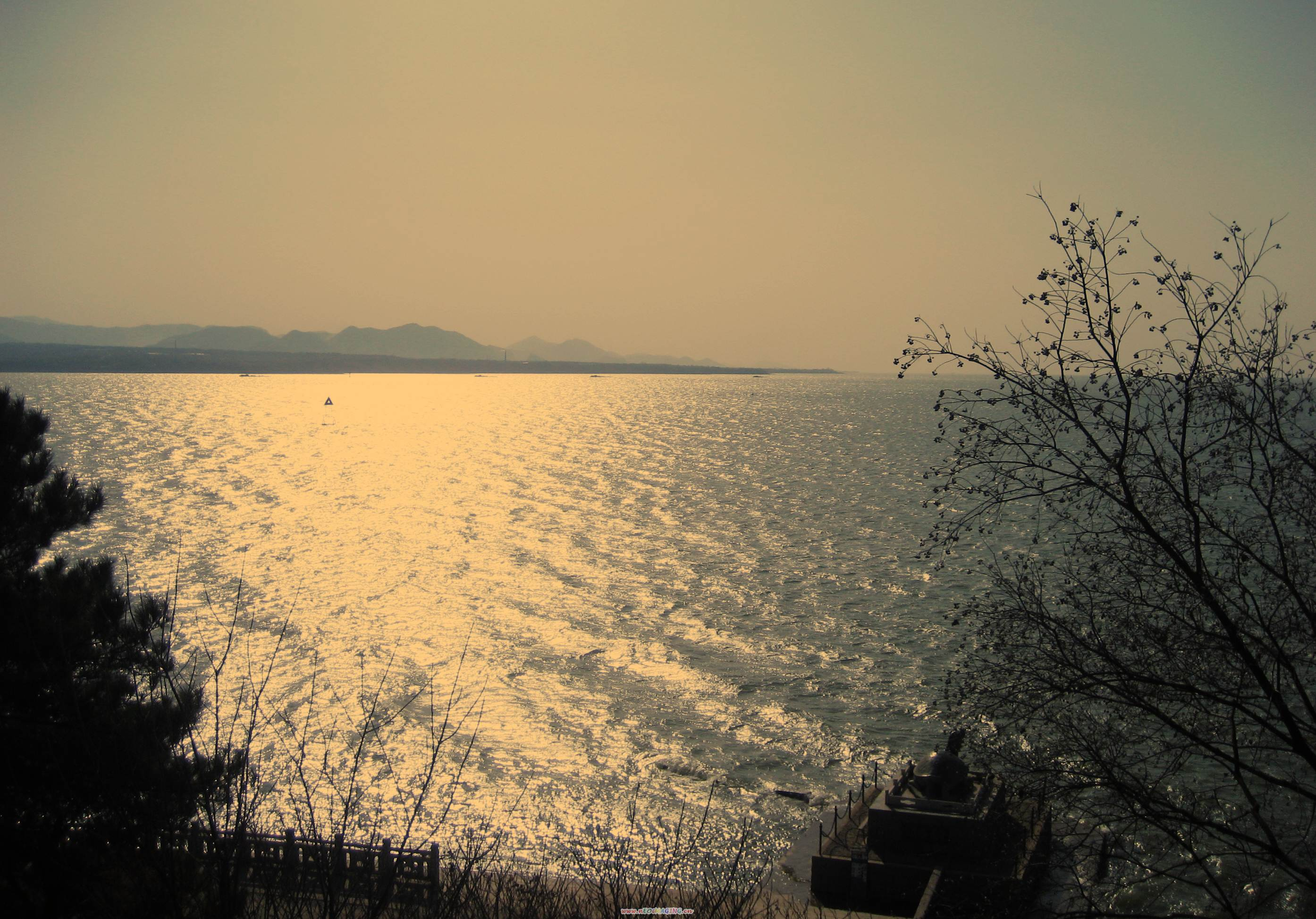 湖光-巢湖